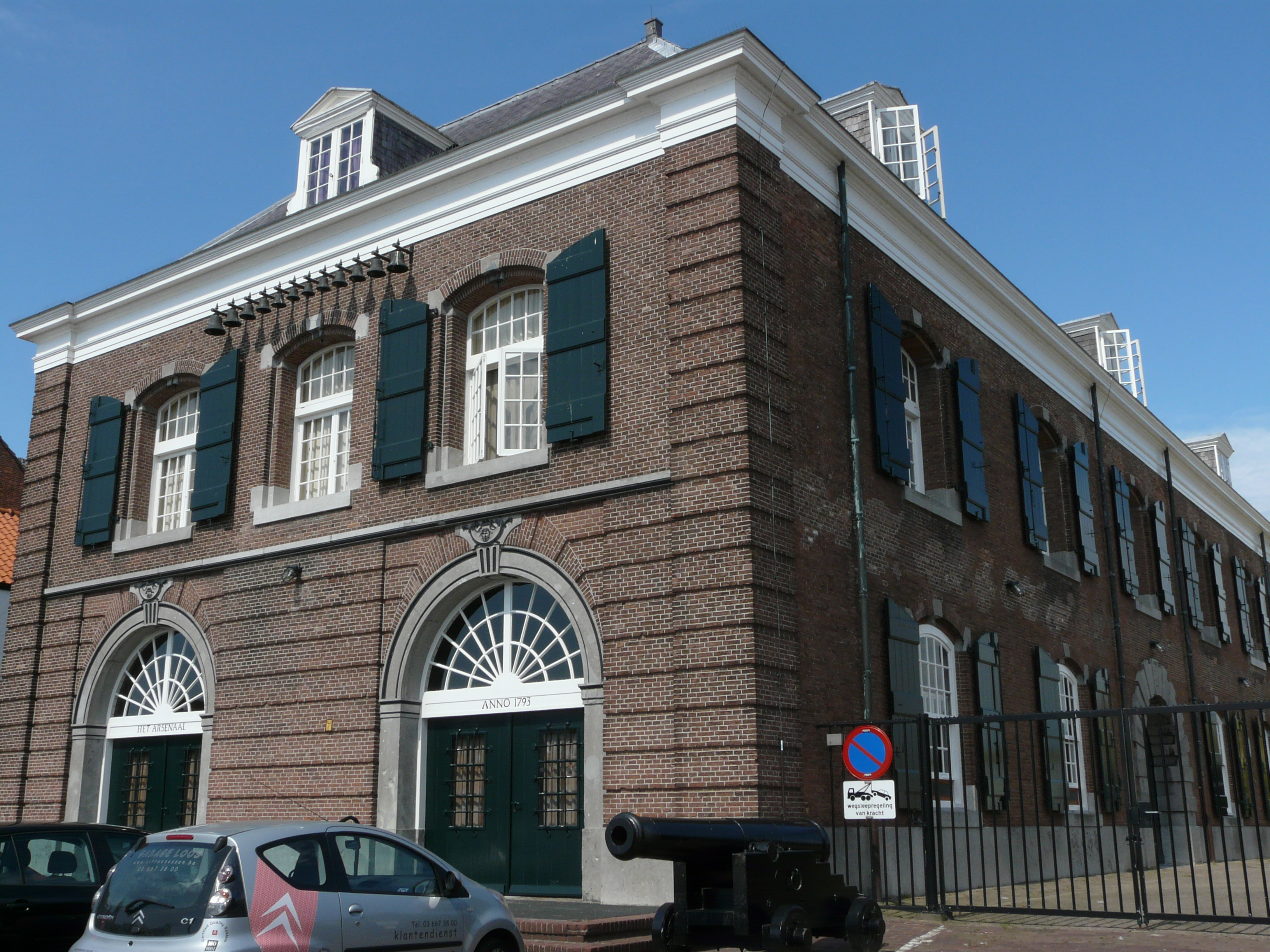 Arsenaal aan de Benedenkade in de haven van Willemstad